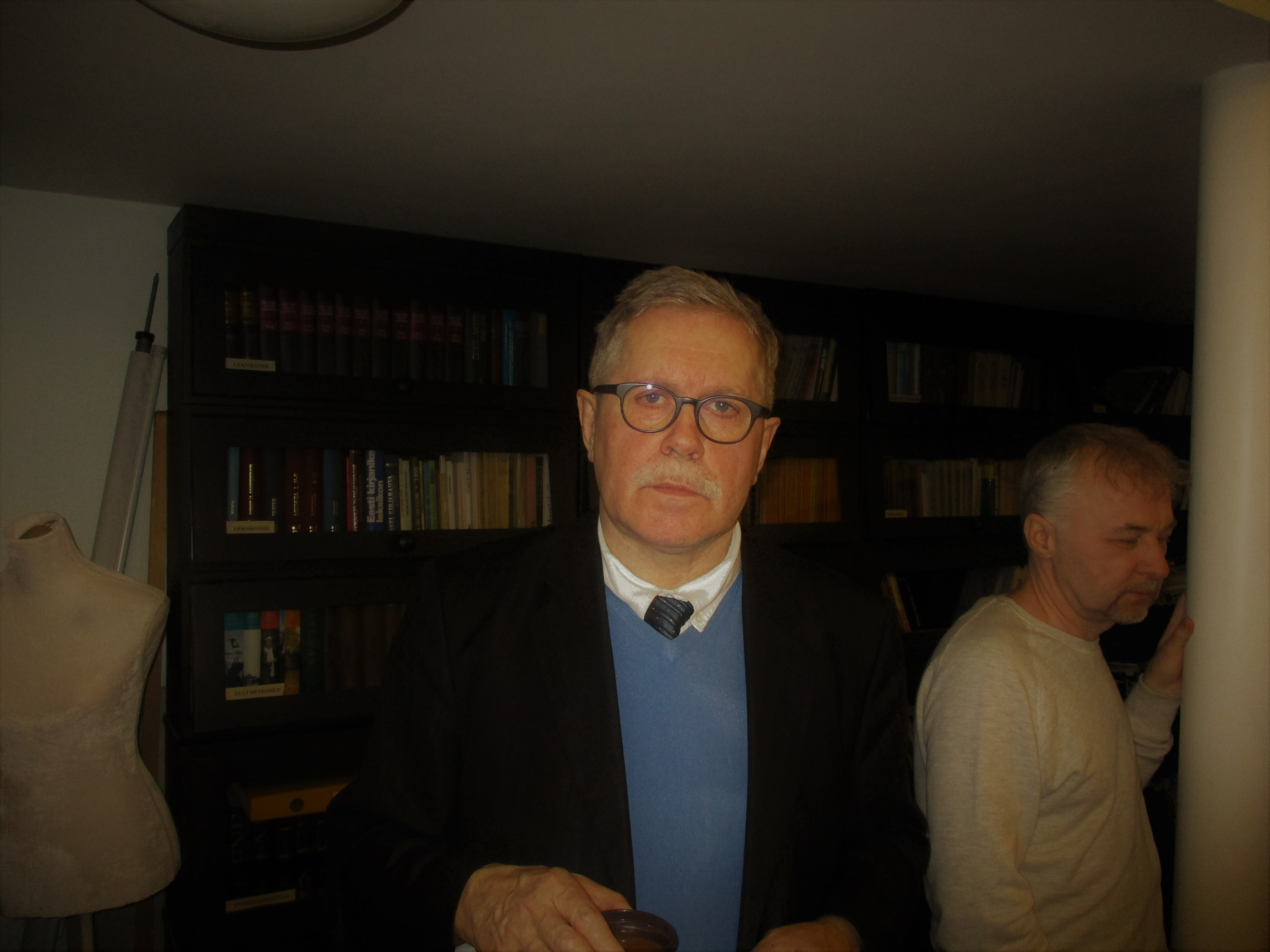 Eesti kirjanik, publitsist ja karikaturist Heiki Raudla Viljandi Muuseumisõprade Seltsi üritusemiljöös veebruaris 2018 Viljandi muuseumis. Viljandi Muuseumisõprade Seltsi ettekandeõhtu 21. veebruaril 2018 Viljandi Muuseumi lugemissaalis.